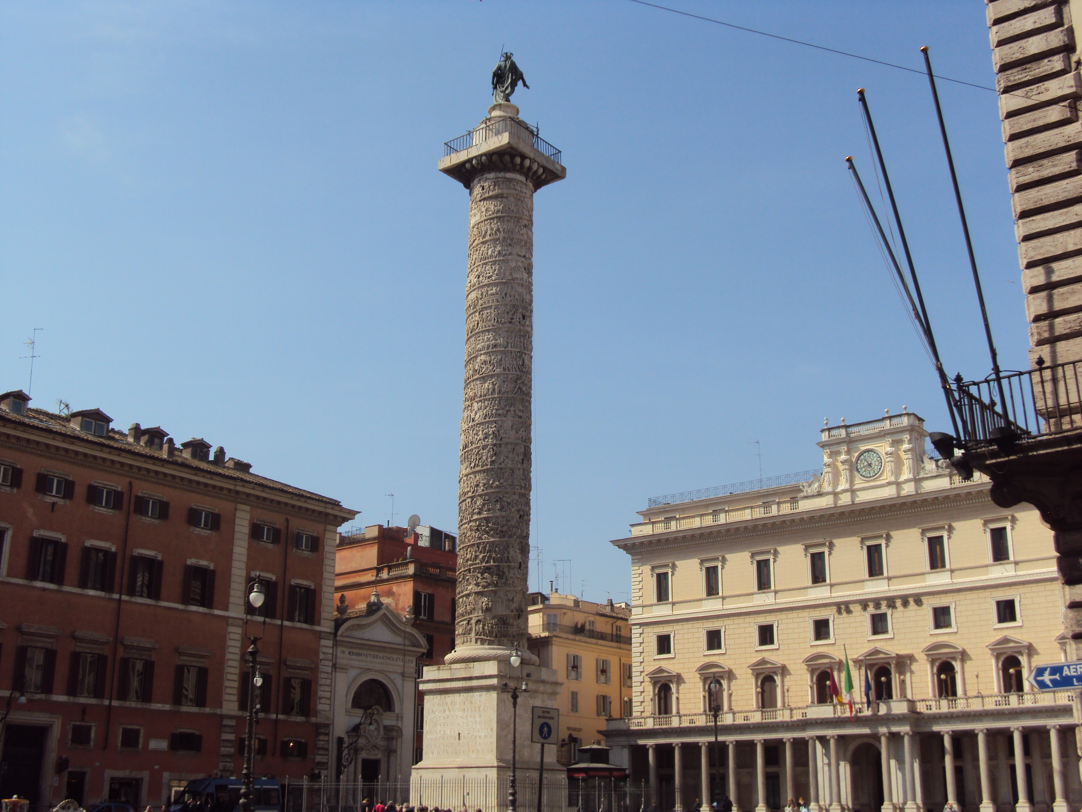 Colonna di Marco Aurelio